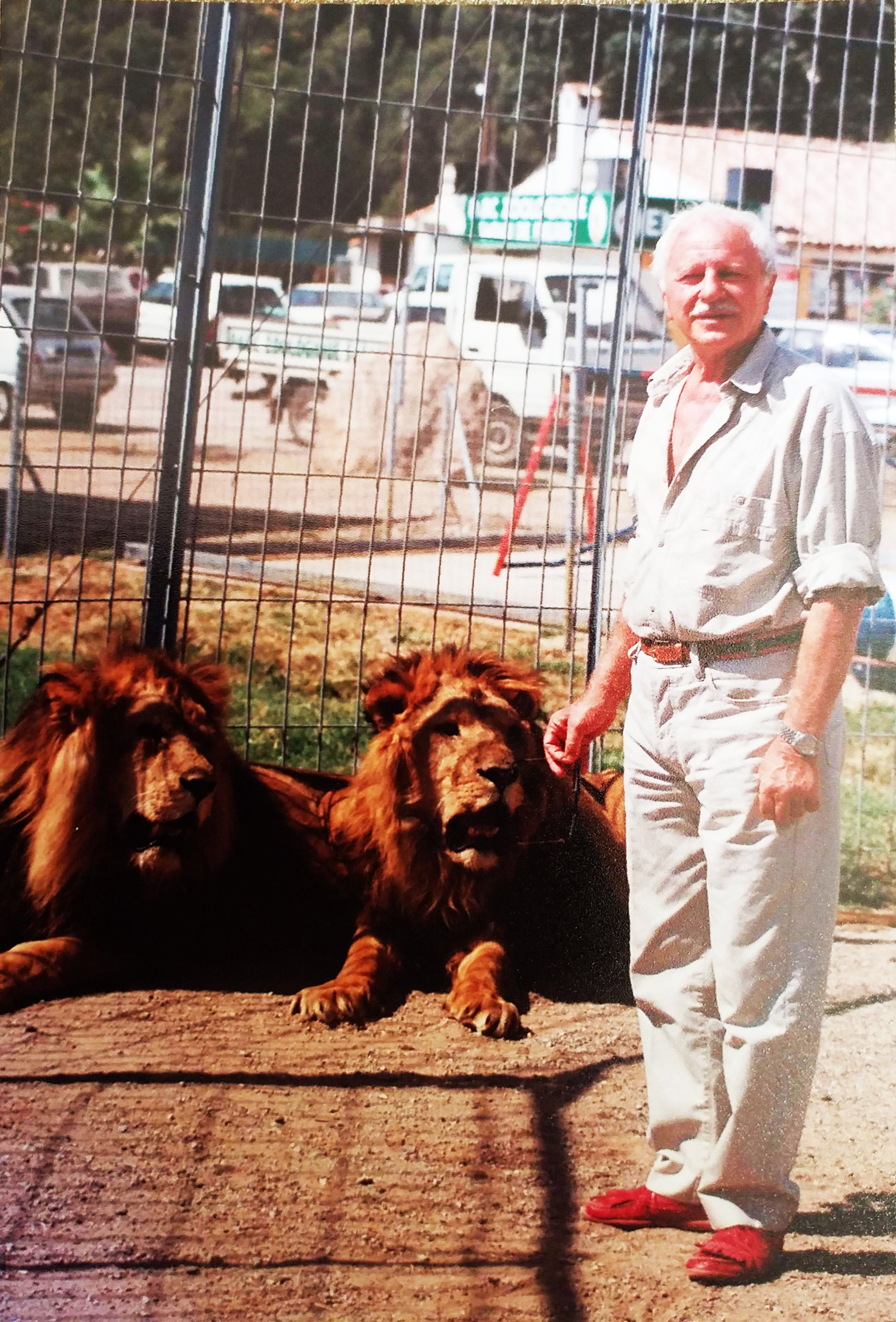 Michel Klein, vétérinaire français, spécialiste de la faune sauvage et animateur de télévision